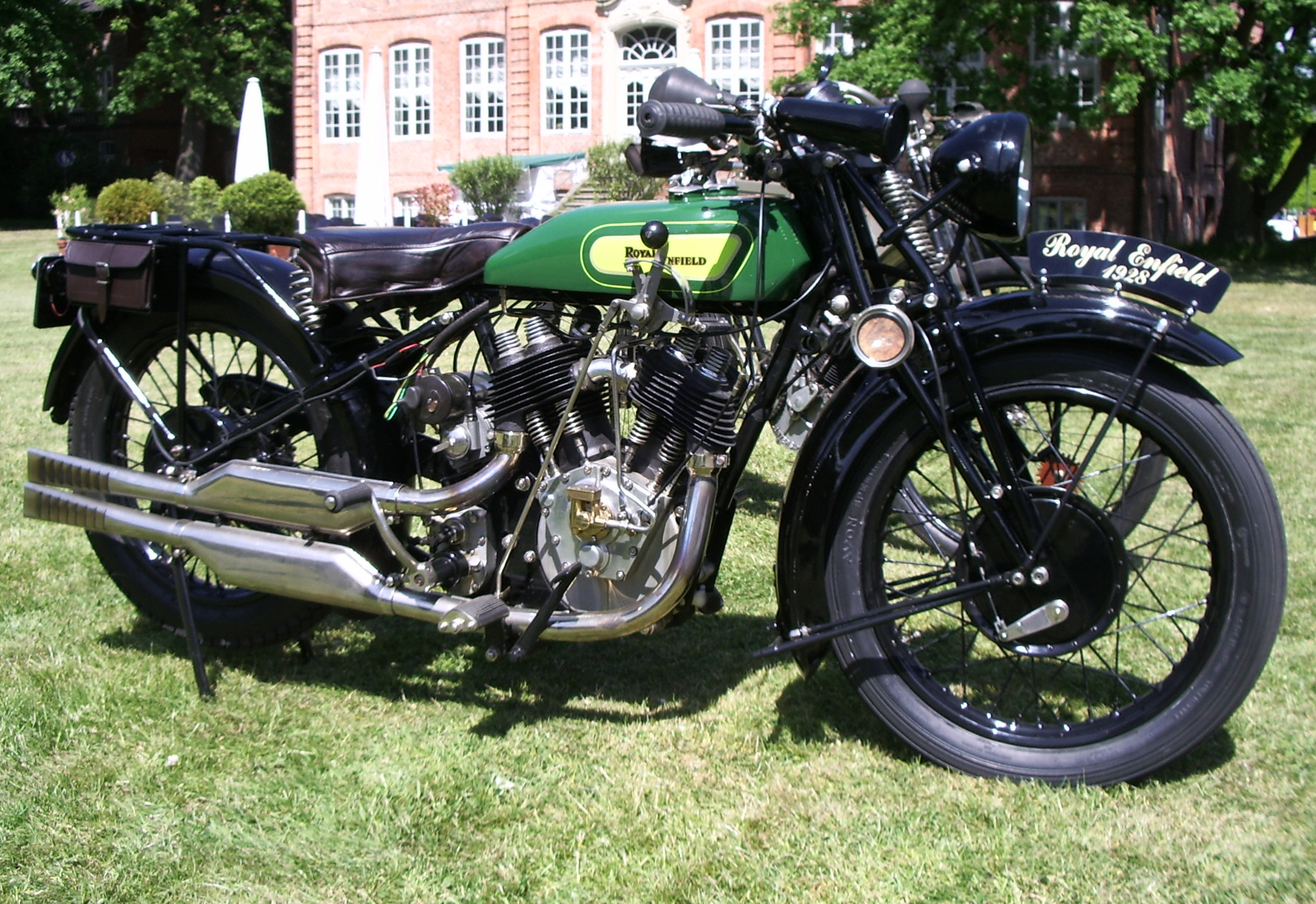 Royal Enfield Baujahr 1928 beim Oldtimertreffen in Uetersen.